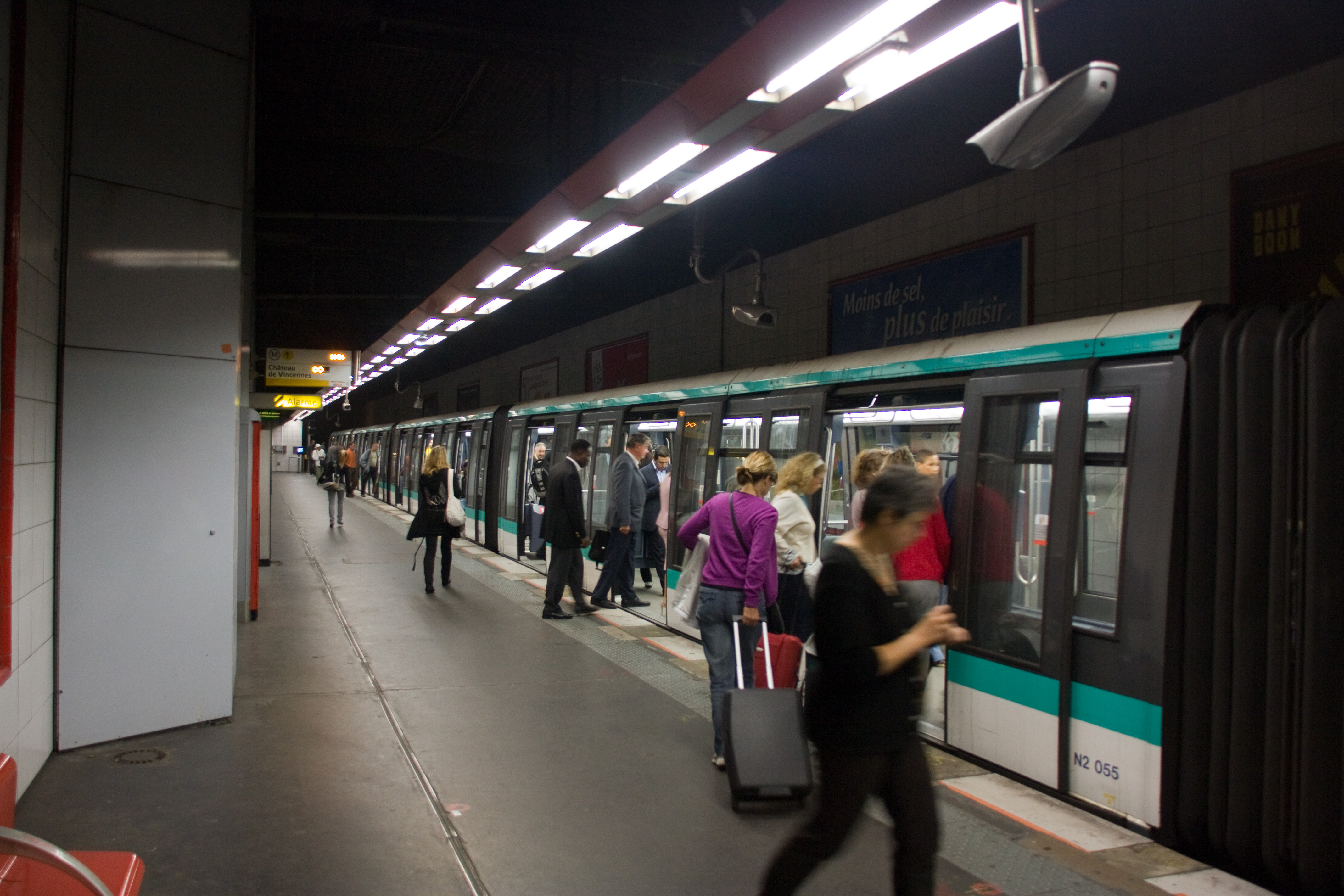 Station Grande-Arche de La Défense, Ligne 1 métro de Paris. (La demie-station, coté départ)